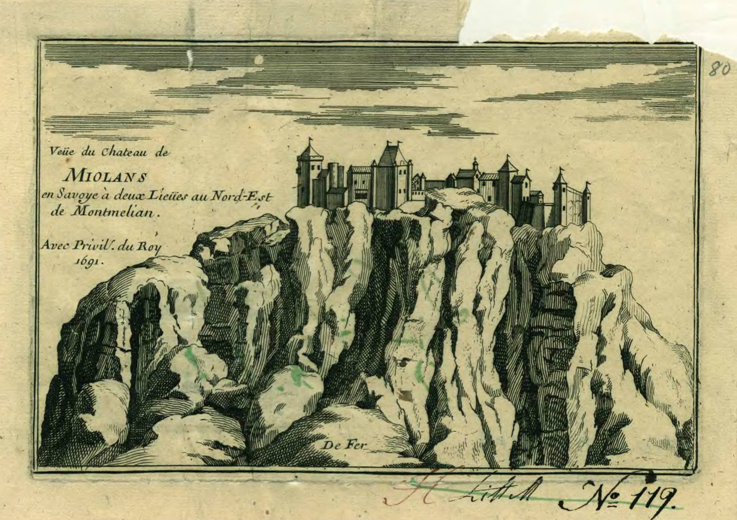 Miolans. Veue du chateau de Miolans en Savoye á deux Lieües au Nord-Est de Montmelian